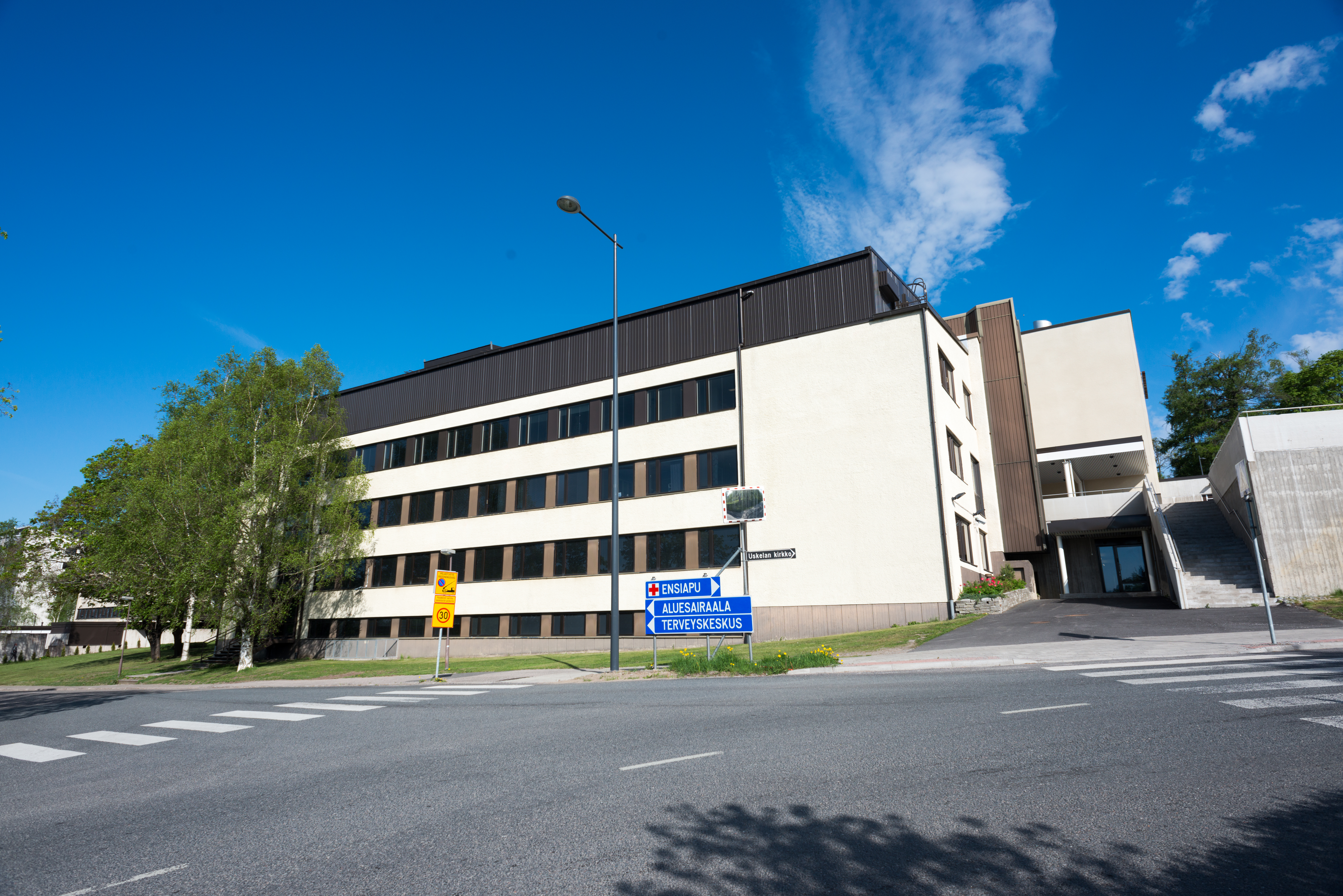 Salon aluesairaala